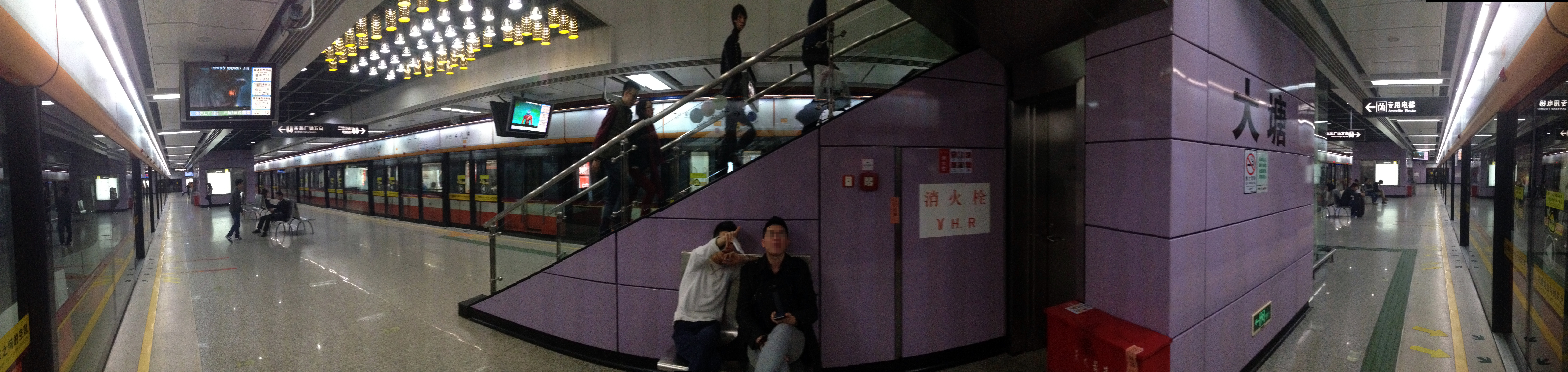 广州地铁3号线大塘站月台全景图